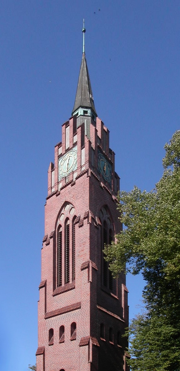 Glockenturm der Ev. Stadtkirche zu Jever